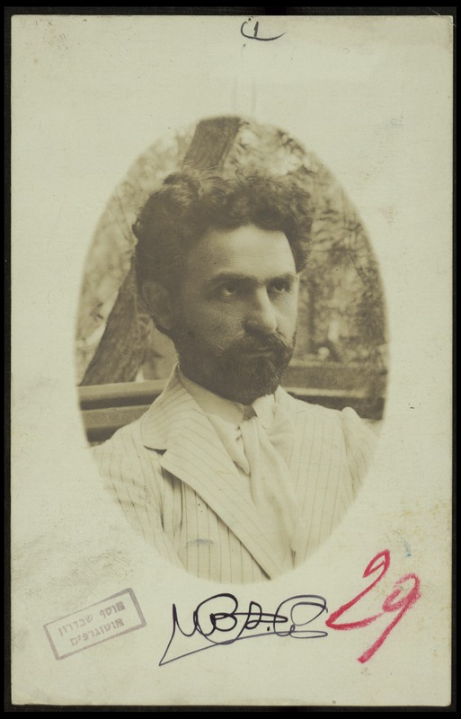 לויה מסוג Real photo ובה תצלום דיוקנו של ש. בן ציון [שמחה אלטר גוטמן]: גווני חום, 9X14 ס"מ. על התצלום חתימת ידו של ש. בן ציון בדיו, על הגלויה לא מצויין מקום או זמן הפקתה. כנראה ארץ ישראל, בערך 1910.